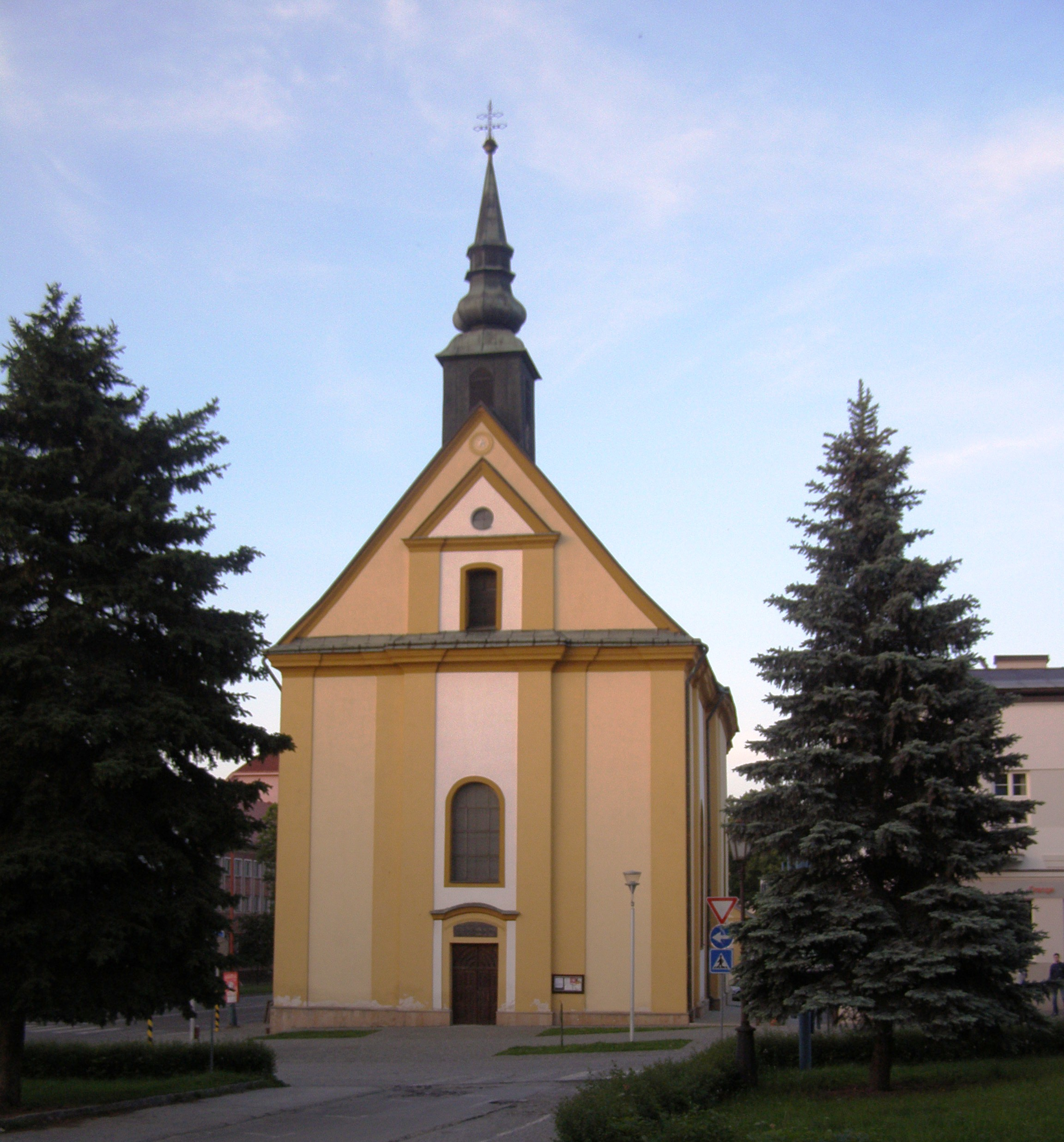 Evanjelický chrám v Bardejove